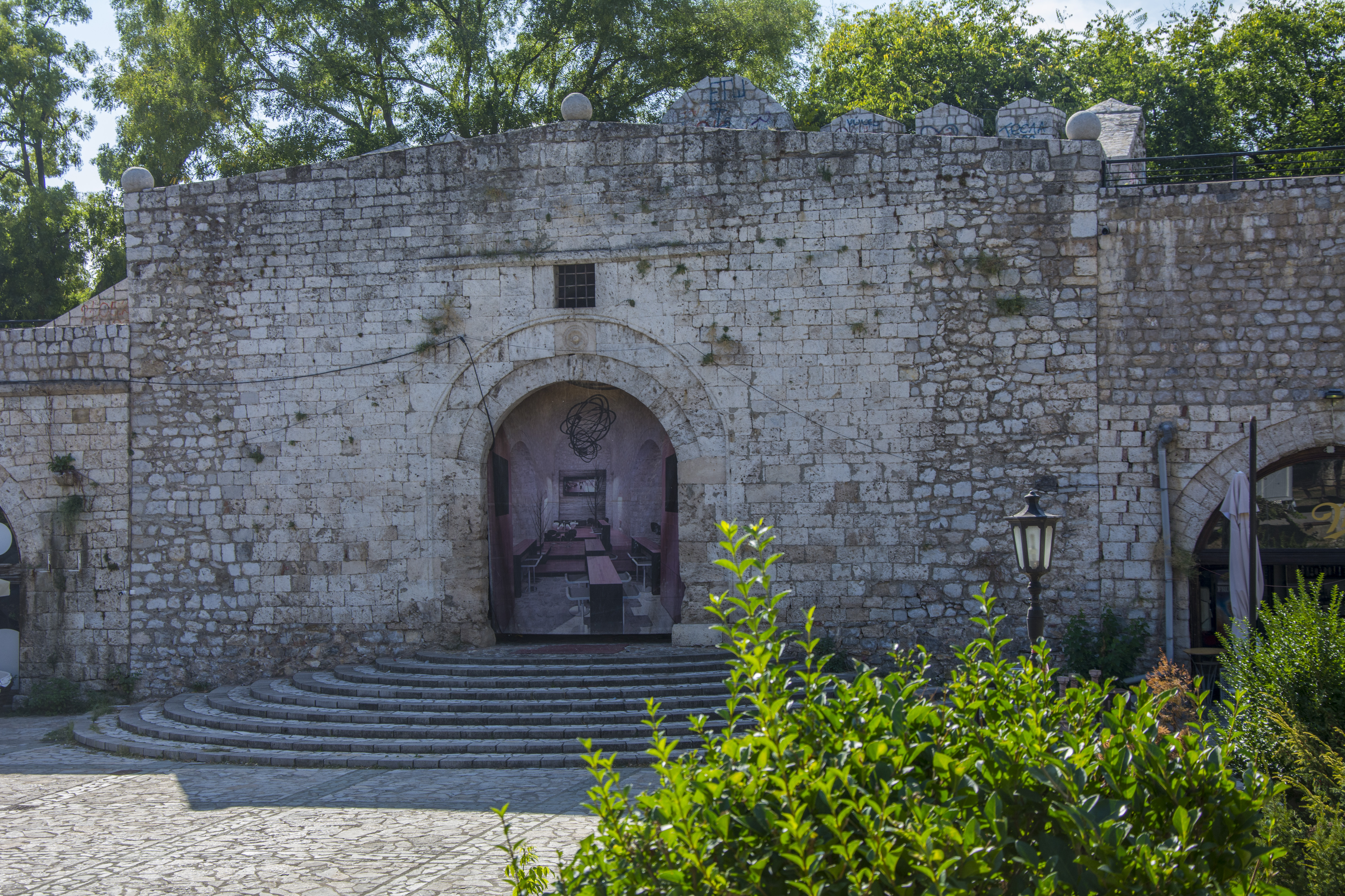 Град Ниш